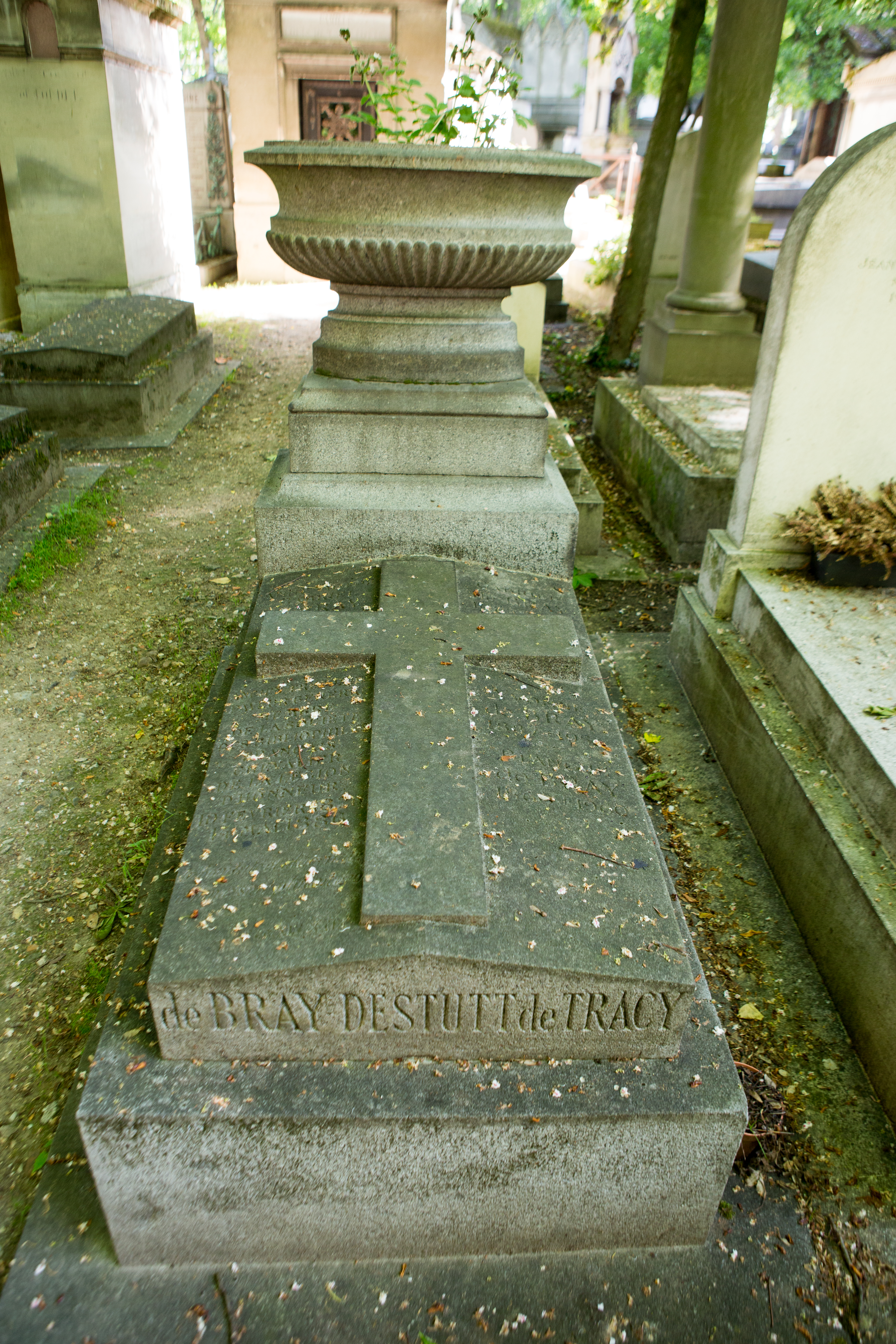 Sépulture d'Yvonne de Bray (1887-1954), actrice.